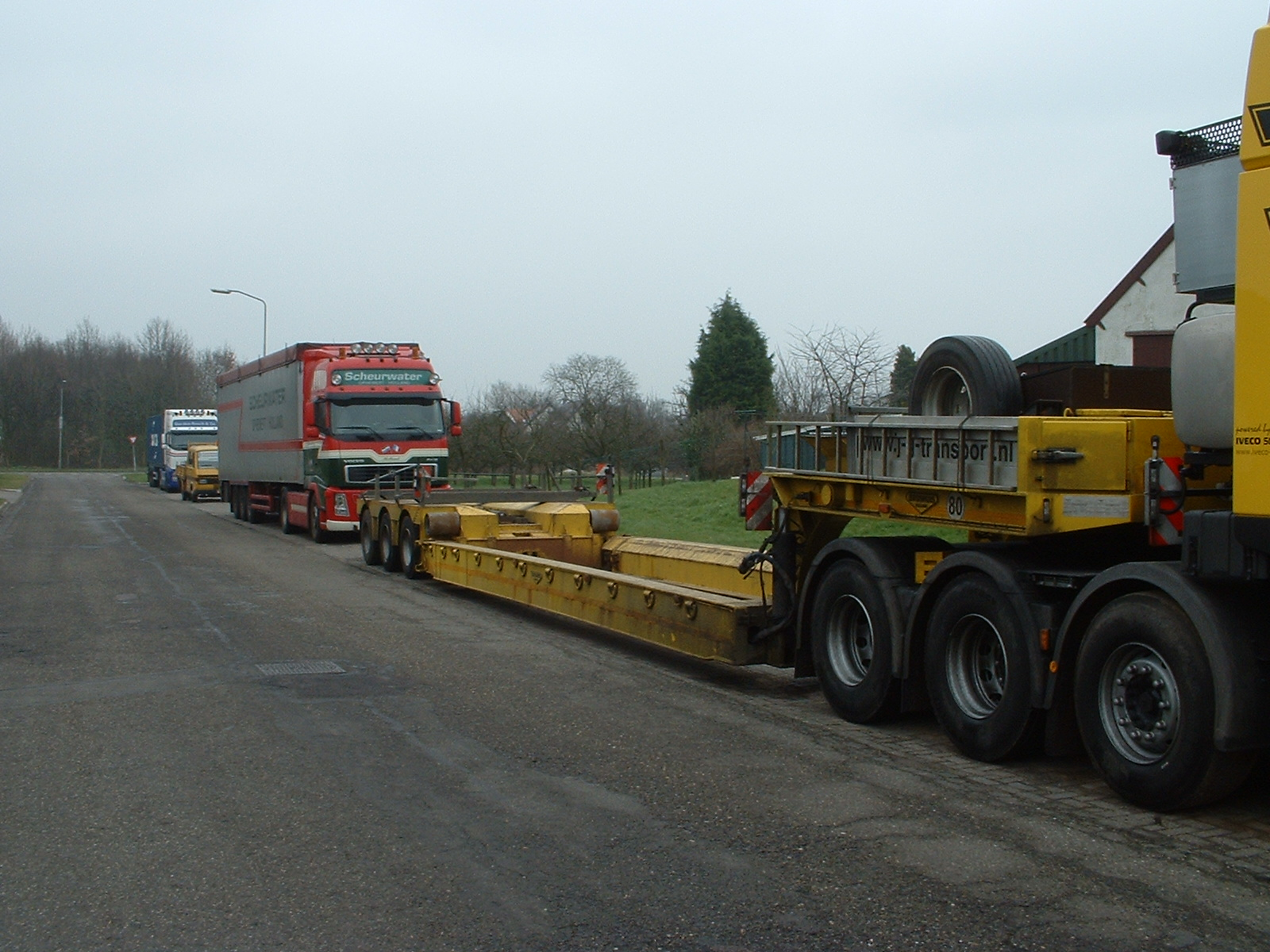 Dieplader Convooi exemptioneel